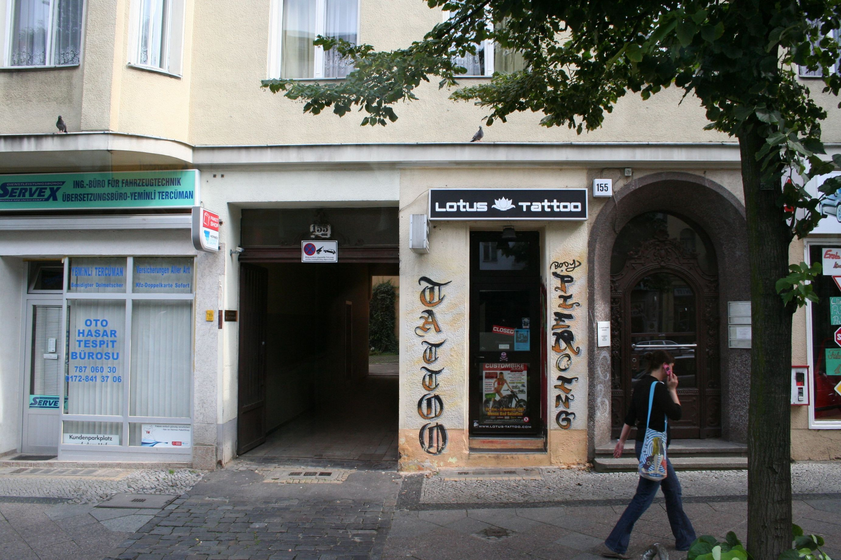 Hauseingang der Schöneberger Hauptstraße 155 in Berlin, wo David Bowie und Iggy Pop zeitweilig lebten und wallfahrende Fans des Öfteren das Hausnummernschild entwendeten